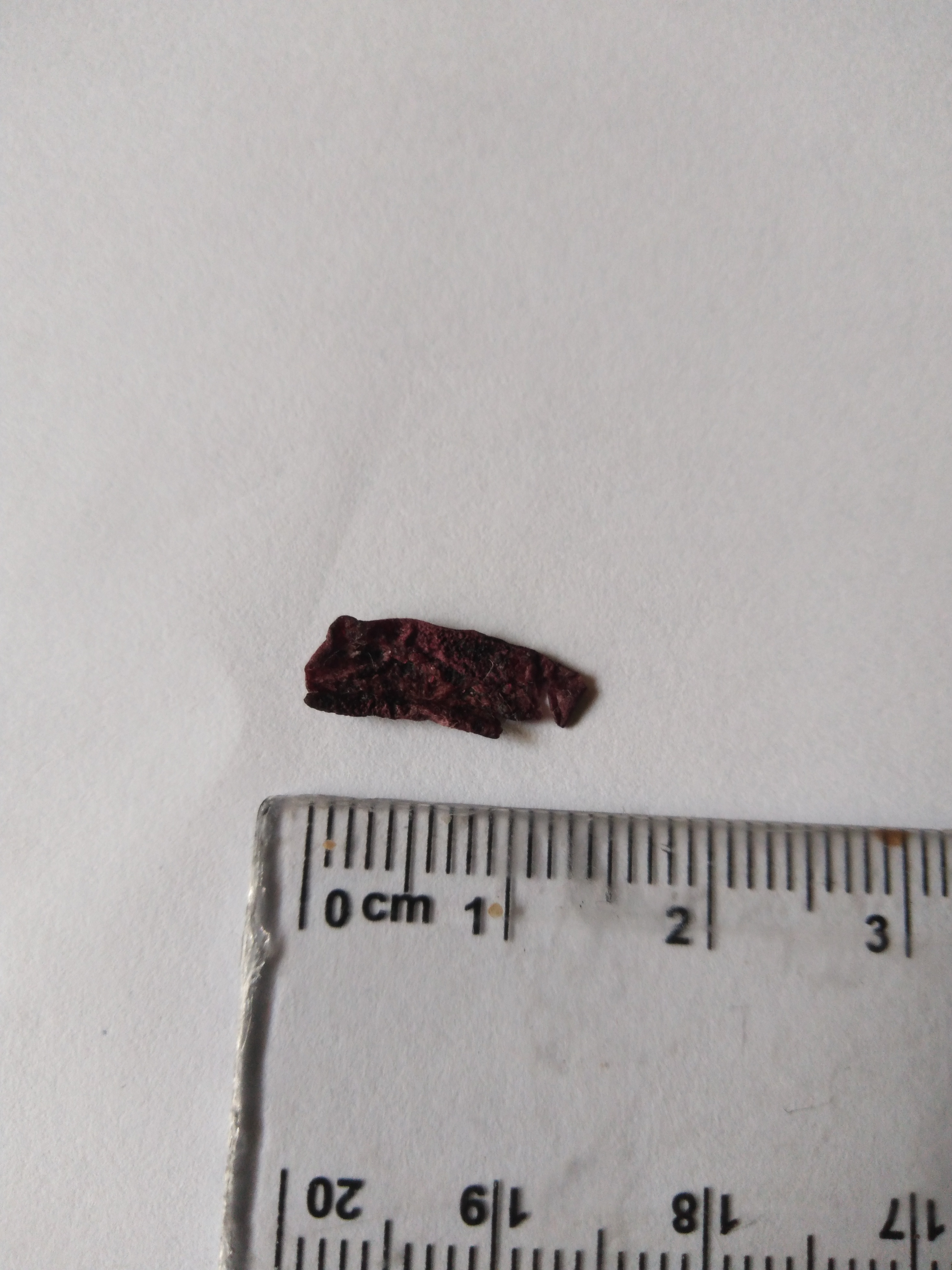 14 letni kikut pępowinowy.